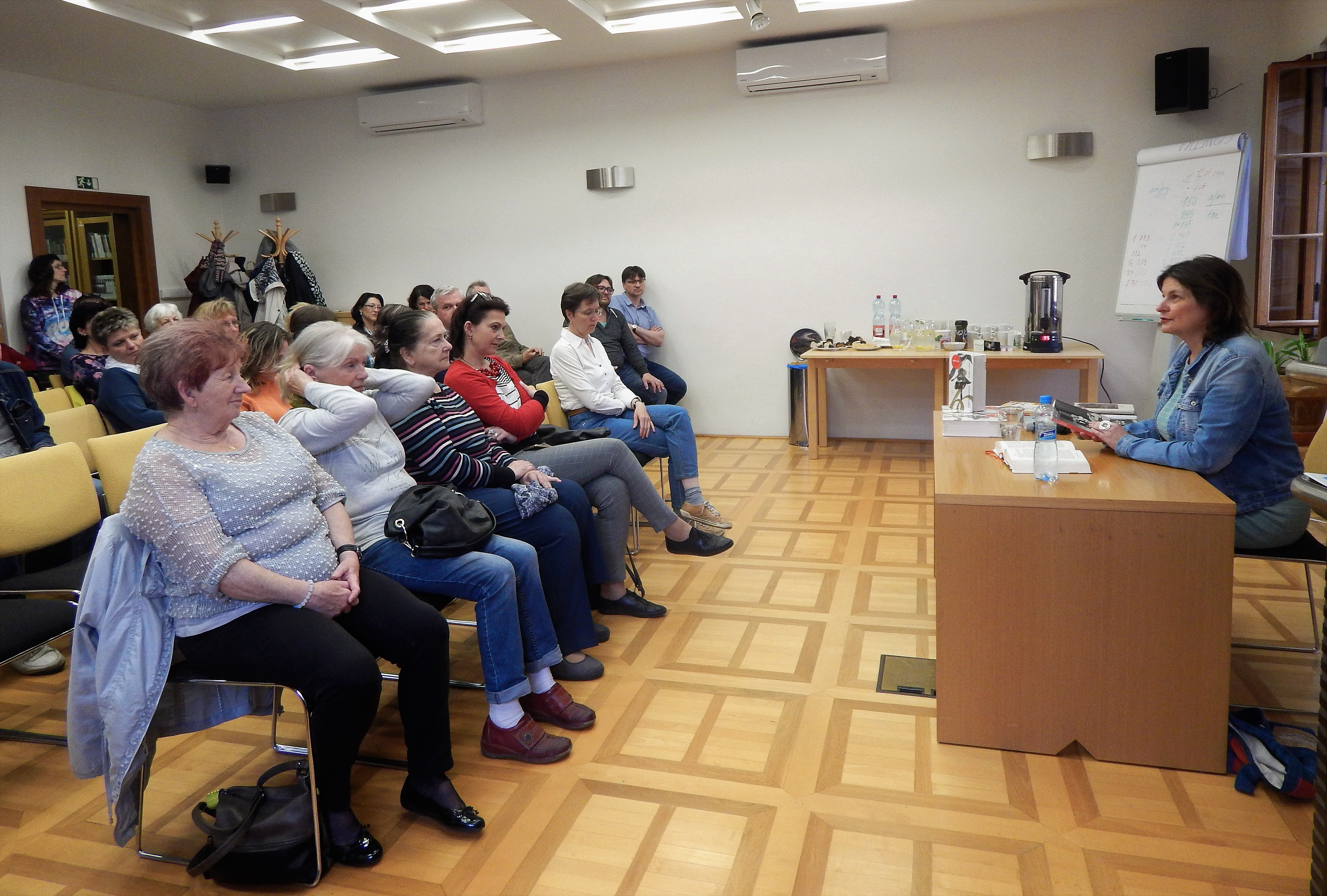 beseda s Radkou Denemarkovou, Krajská knihovna v Pardubicích, květen 2019